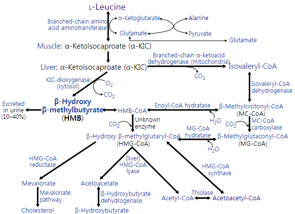 류신의 대사 과정